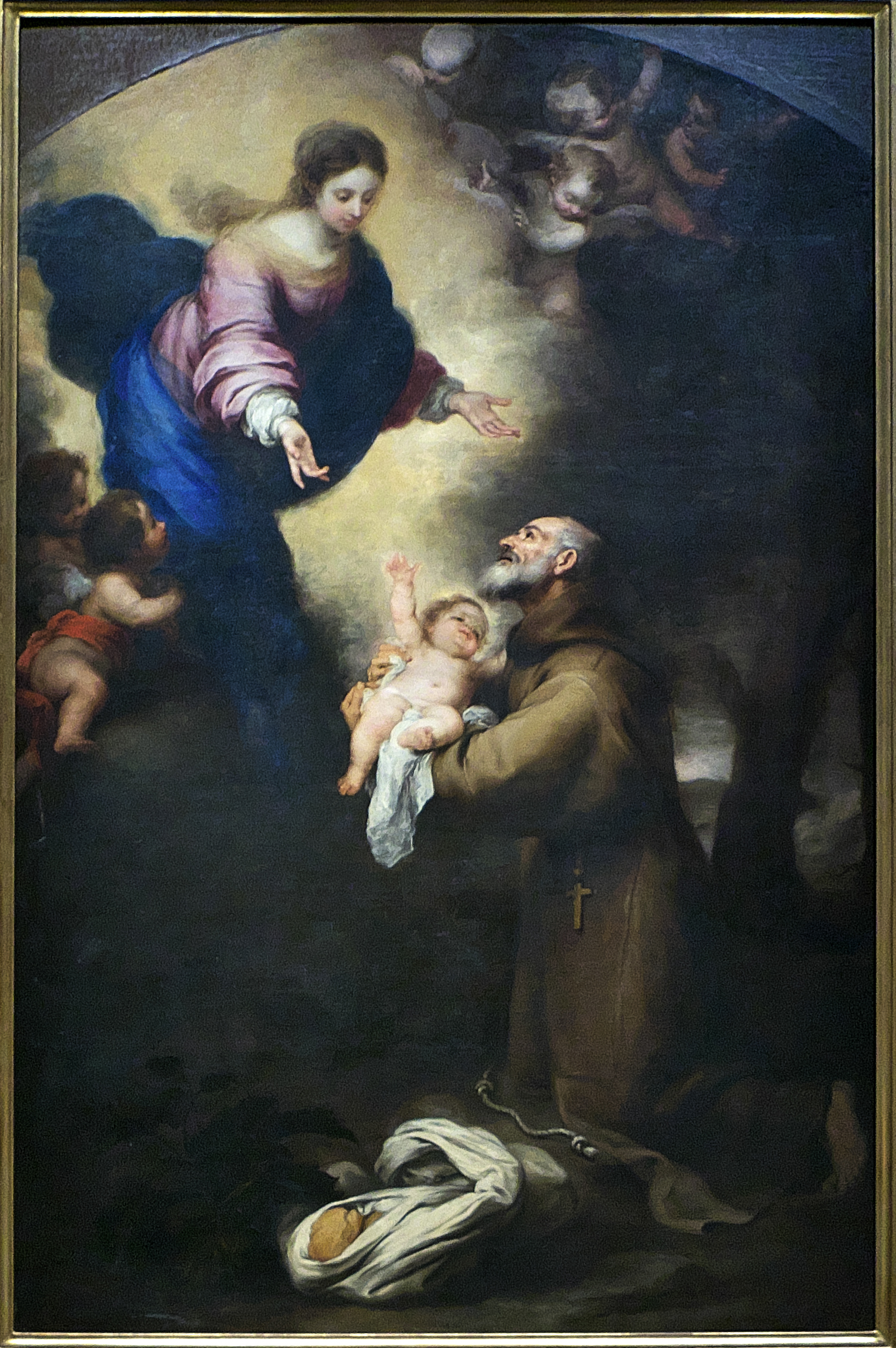 Museo de Bellas Artes de Sevilla. Óleo sobre lienzo (1668-1669) pintura destinada a la nave de la Epístola del Convento de Capuchinos (Sevilla). San Félix Cantalicio agradece a la Virgen la entrega del Niño.